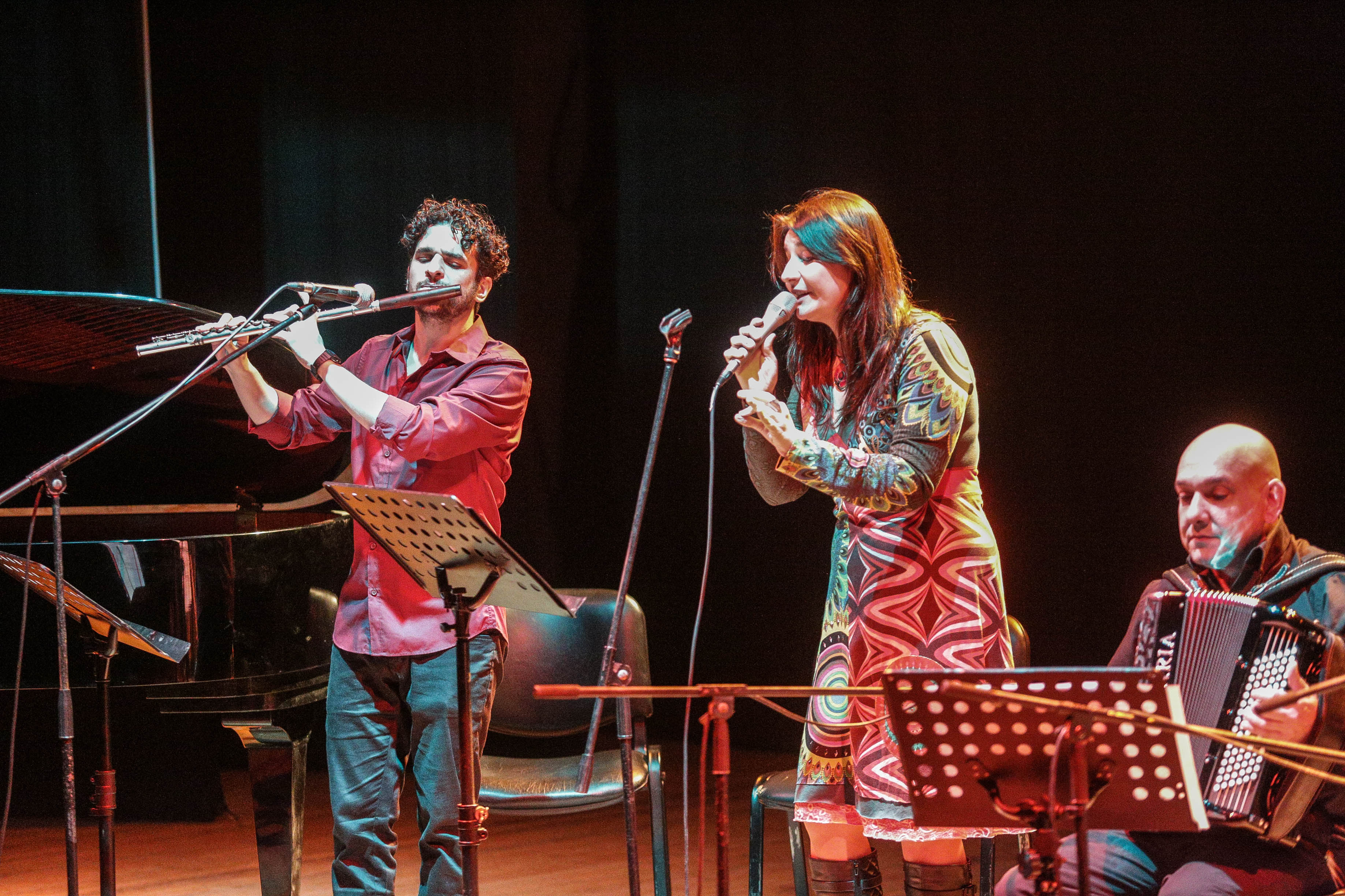 San Miguel de Tucumán, 5 de septiembre de 2015 - El Ministerio de Cultura de la Nación presentó el ciclo "La Música Interior" en la provincia de Tucumán con la participación de Luciana Jury, Sebastián Henríquez, Federico Arreseygor, Diego de la Zerda, Lucas Monzón, Jorge Luis Reales, Marcelo Moguilevsky, Federico Siksnys, Nadia Szachniuk, Carlos Moscardini, Fernando Lernoud, Emilio “Chuni” Cardozo, Lucho Hoyos, Hugo Rodríguez, Mariano Agustoni, Mauro Ciavattini, Mara Szachniuk, Pablo Fraguela, Florencia Bernales, Manuel Sija, Aldana Bozzo, Juan Martín Caraballo, José González, Nini Flores, Agustín “Chungo” Roy, María de los Ángeles “Chiqui” Ledesma, Juampi di Leone, Leonel Iglesias, Ariel “El furia” Alberto.